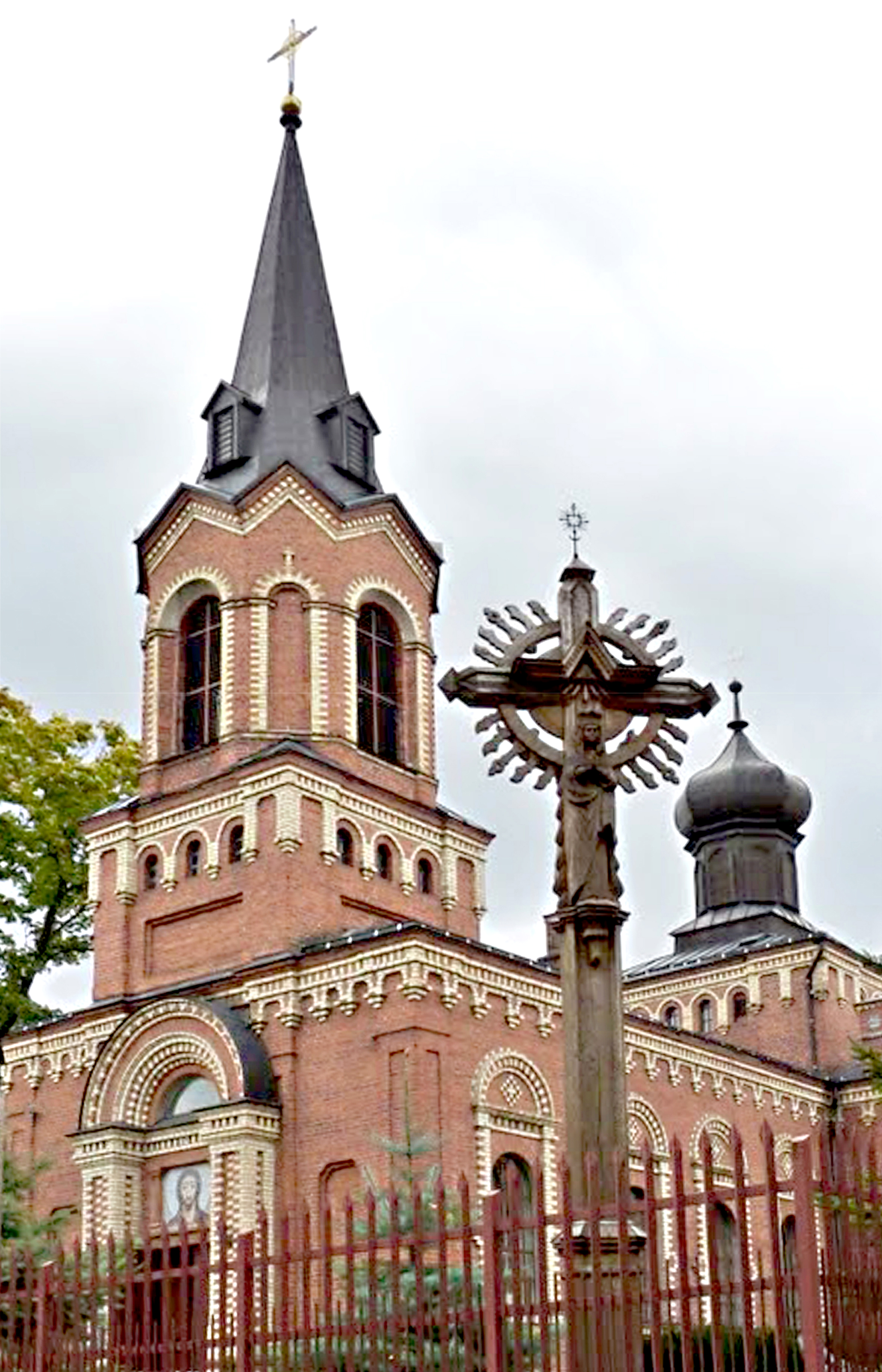 04 Marijampolės Šv. Vincento Pauliečio bažnyčios bendras vaizdas